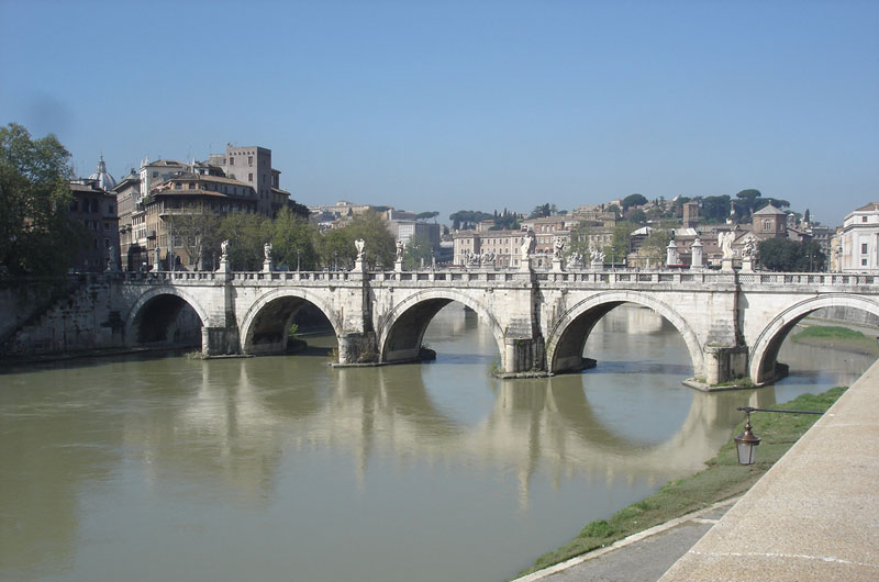 Tiber, Rome: Ponte sant'Angelo